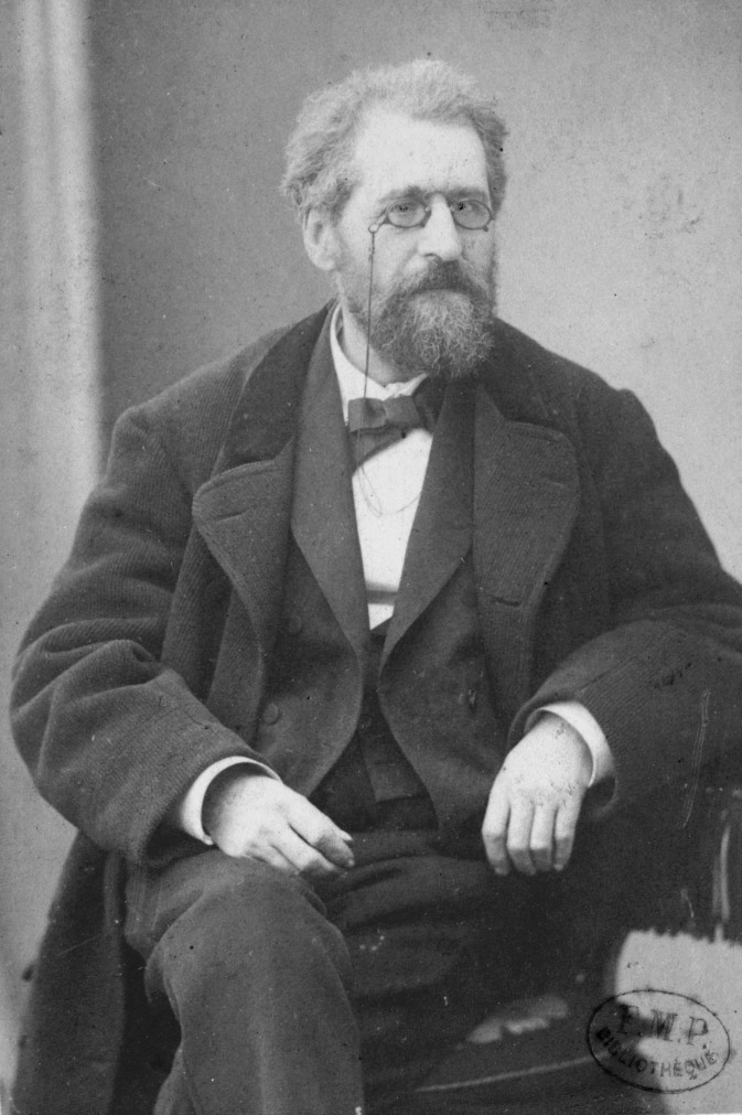 Portrai E. L. Grimaux